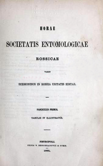 Труды Русского энтомологического общества, 1861